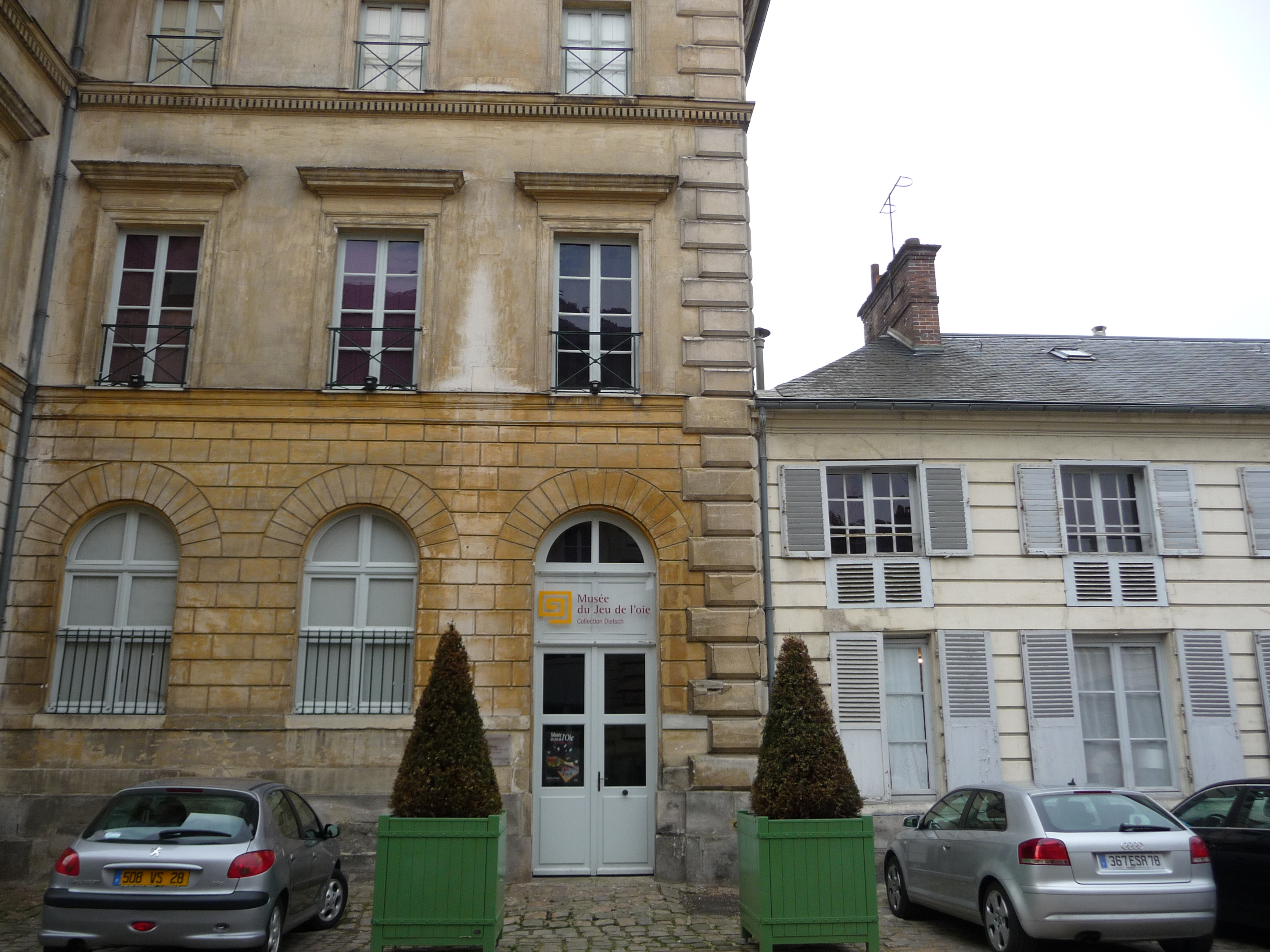 La façade du musée du jeu de l'oie à Rambouillet.